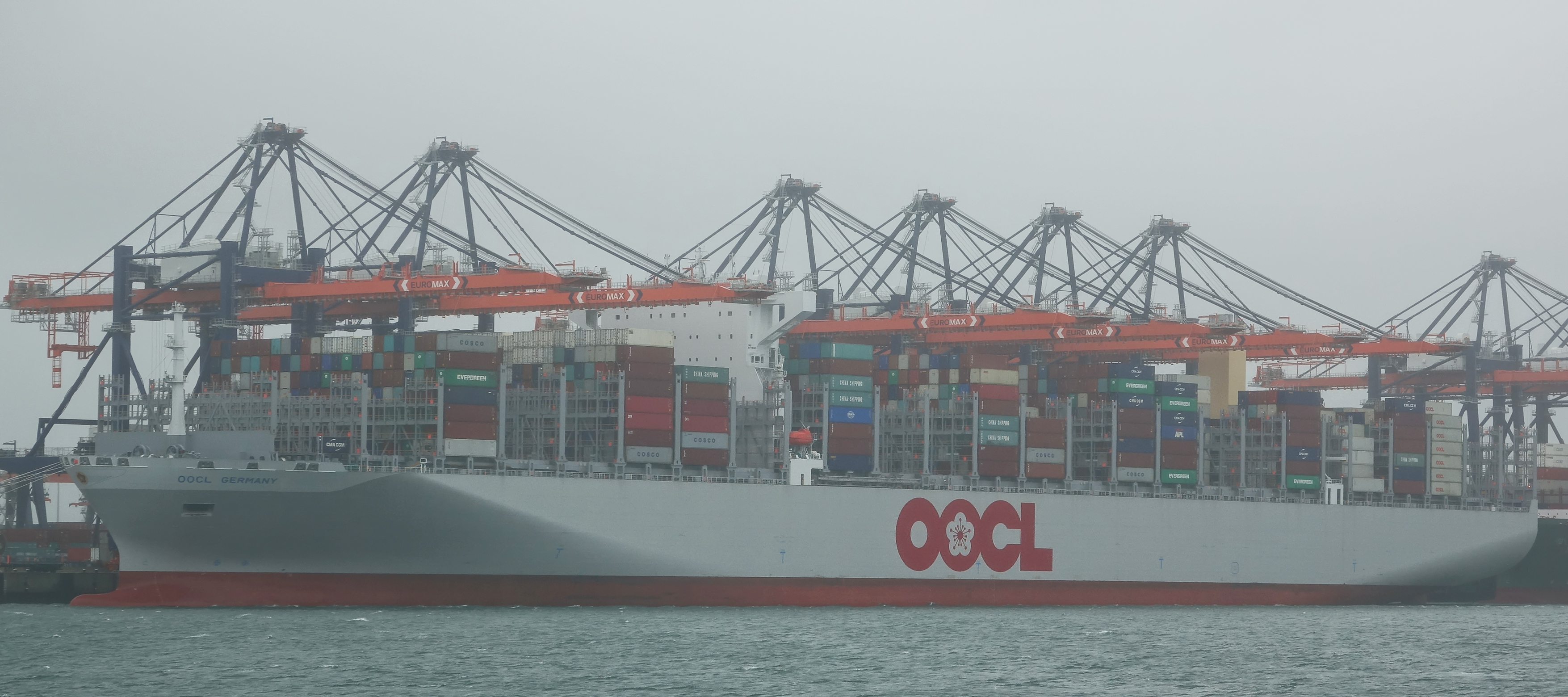 Euomax terminals Yangtzehaven 7-10-2017